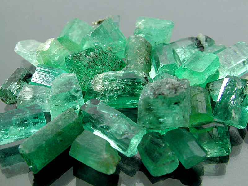 Зүмірет тасы